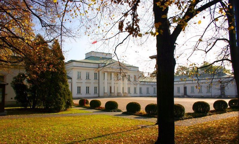 Warszawa (Polska)